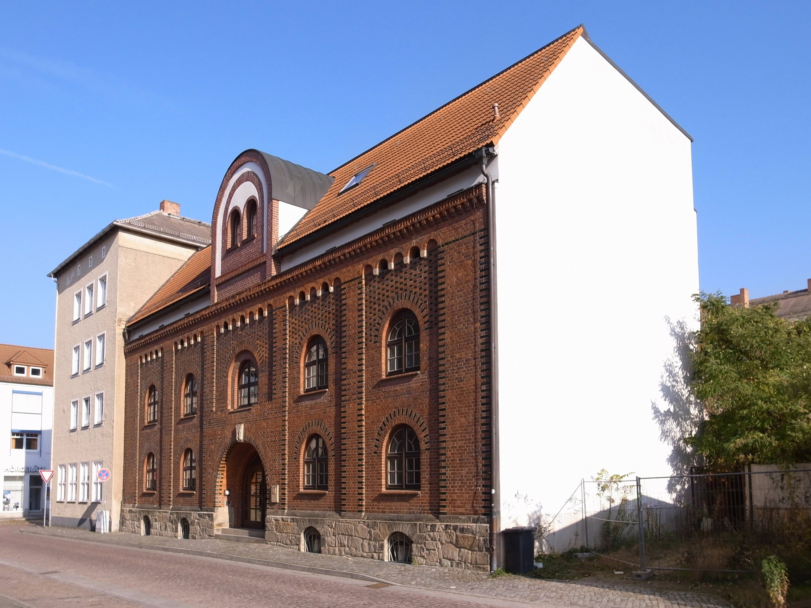 Stadtarchiv Dessau-Roßlau in der Langen Gasse 22